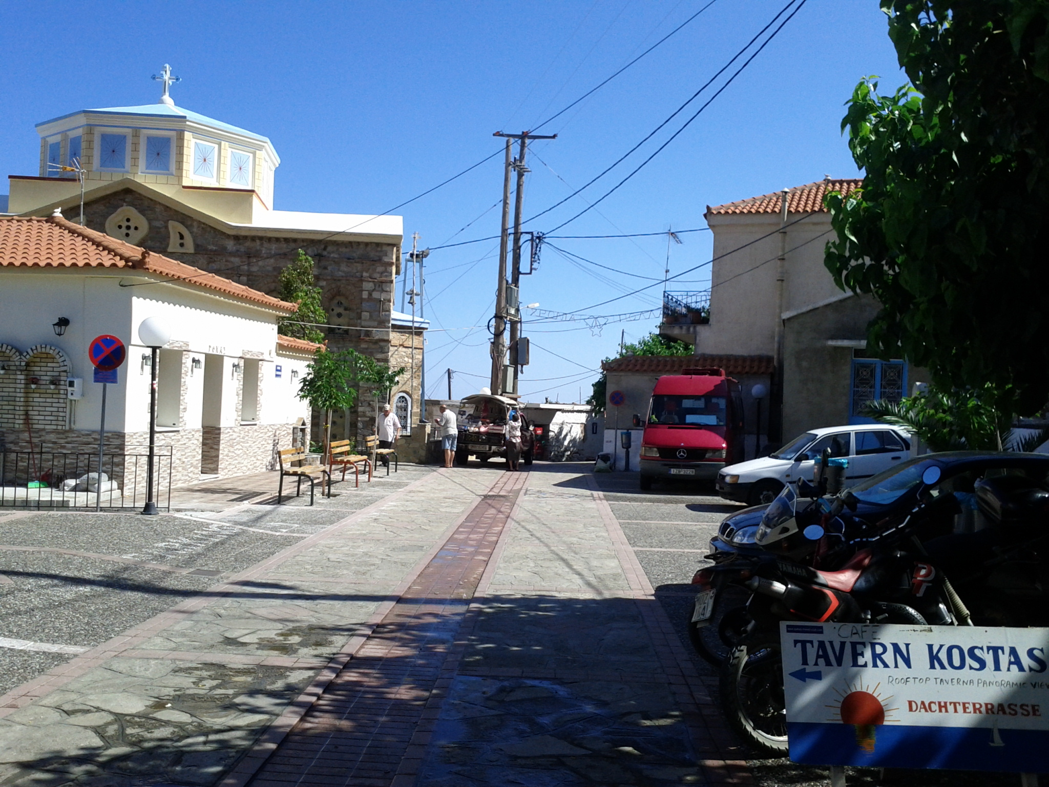 Drakaioi